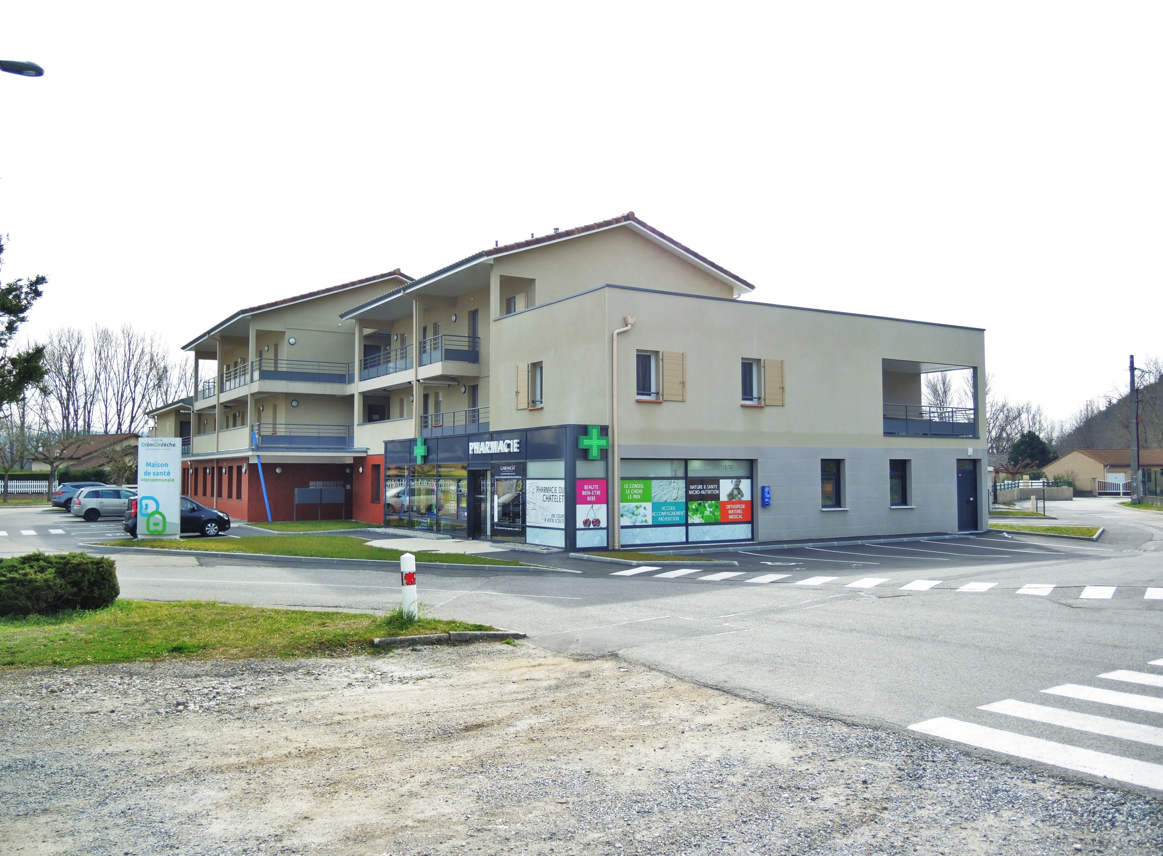 Andance vue générale et détails